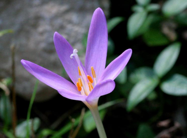 Colchico d'autunno